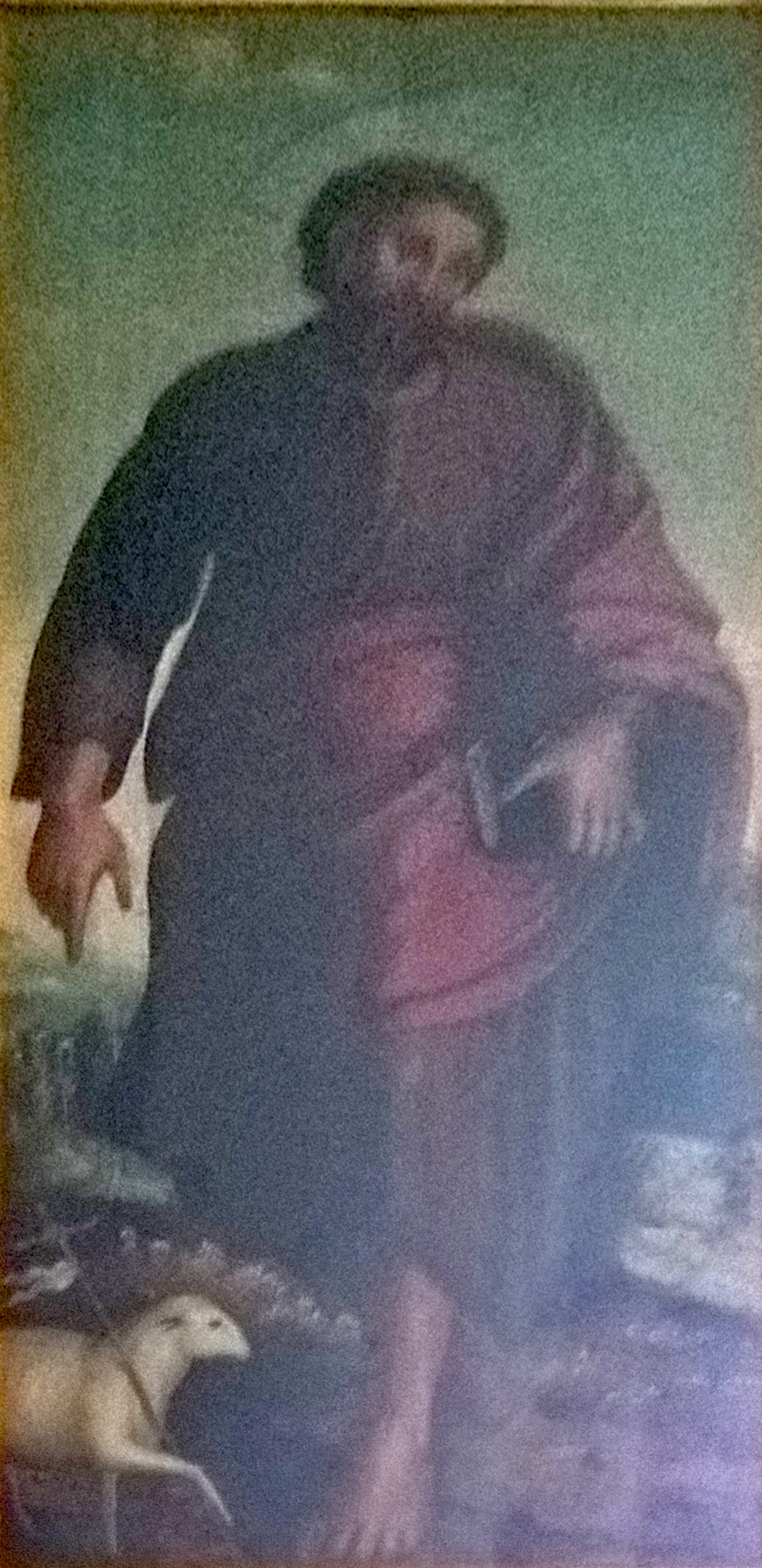 Pintura "S. João Baptista" do Mestre de Arruda dos Vinhos, integrante do Políptico quinhentista da Matriz de Arruda dos Vinhos, de cerca de 1550